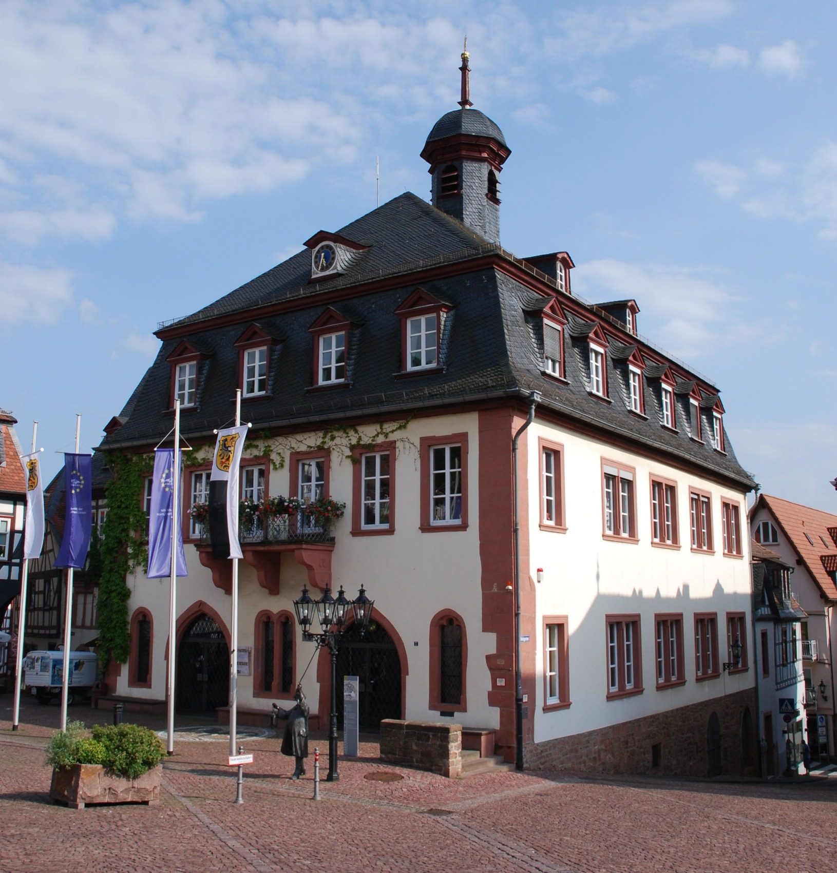 Rathaus Gelnhausen